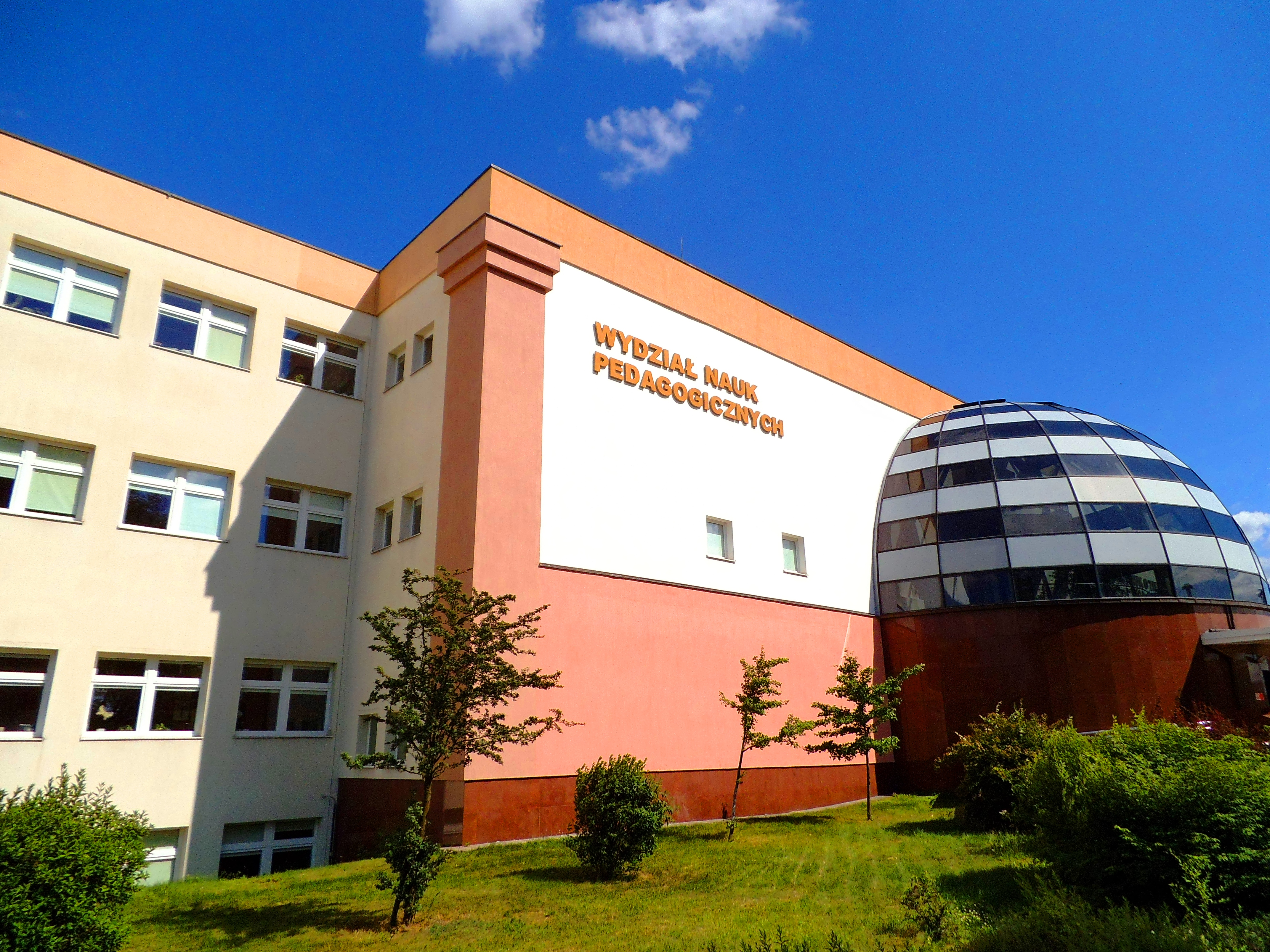 Wydział Nauk Pedagogicznych UMK w Toruniu